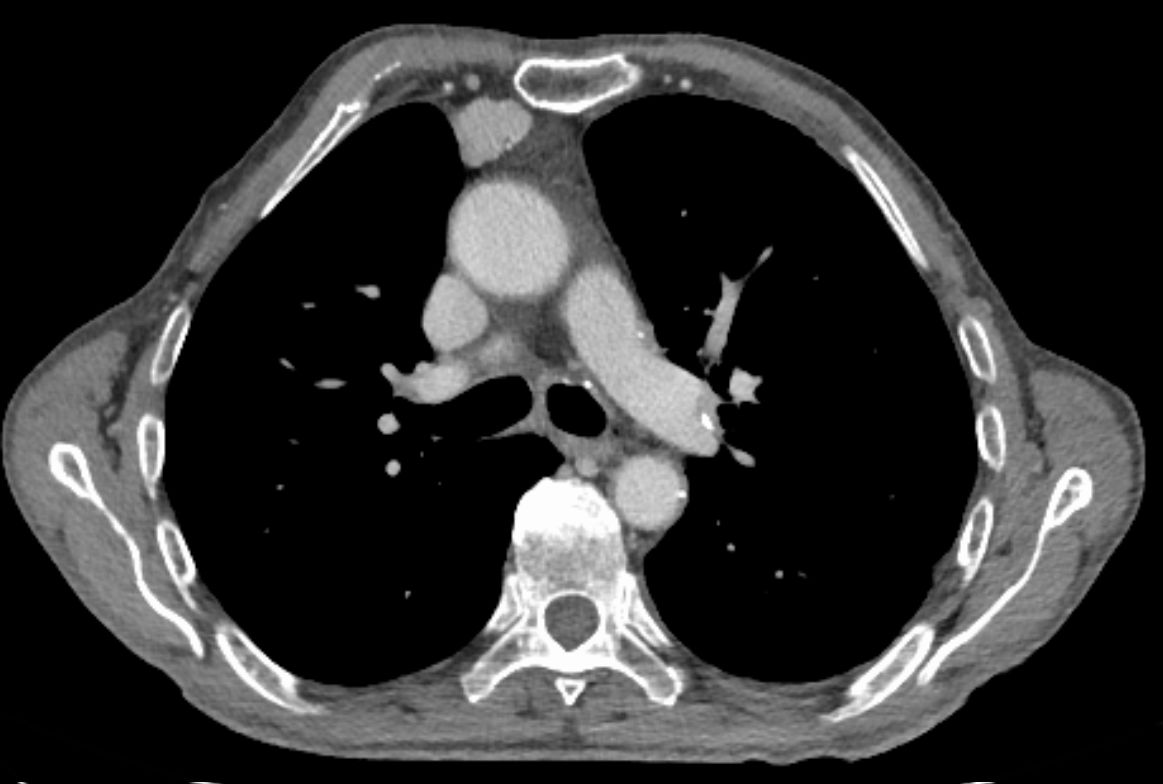 Mikronoduläres Thymom mit lymphoidem Stroma. Hier Computertomographie axial.